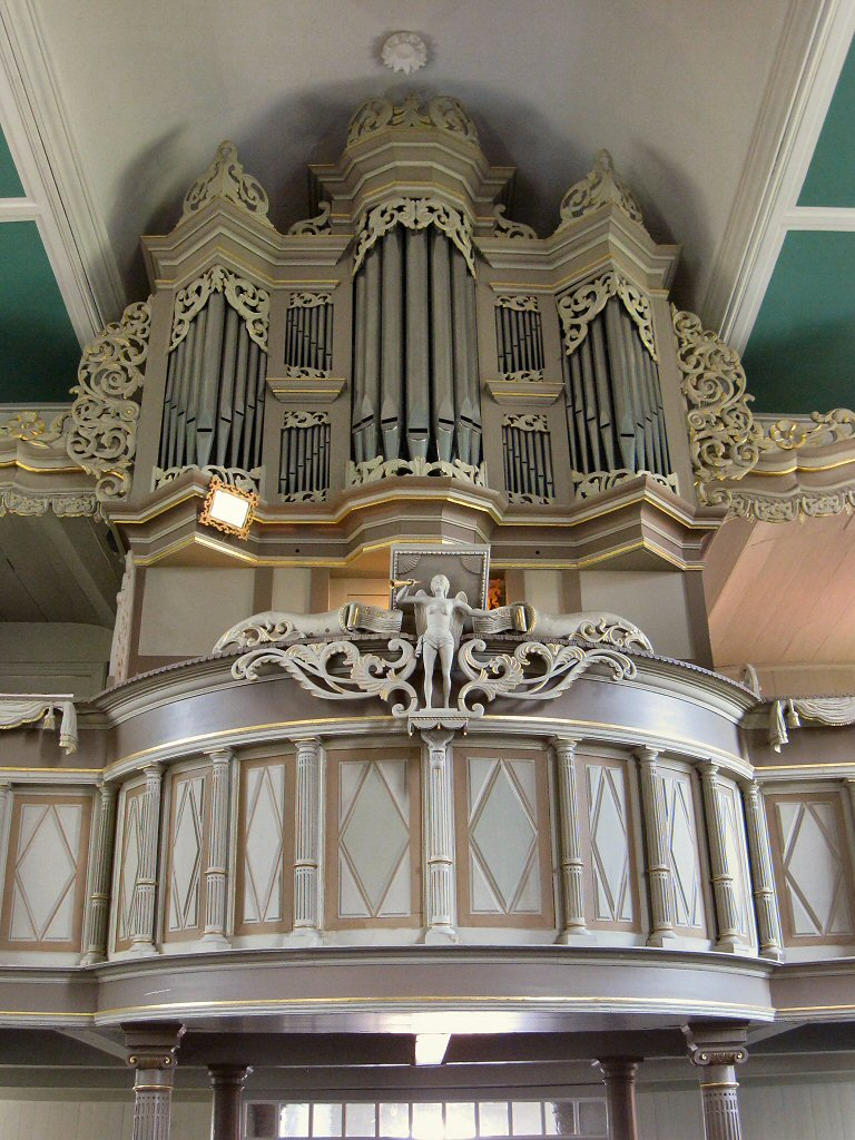 Orgelprospekt der Greetsieler Kirche in Greetsiel (Ostfriesland)